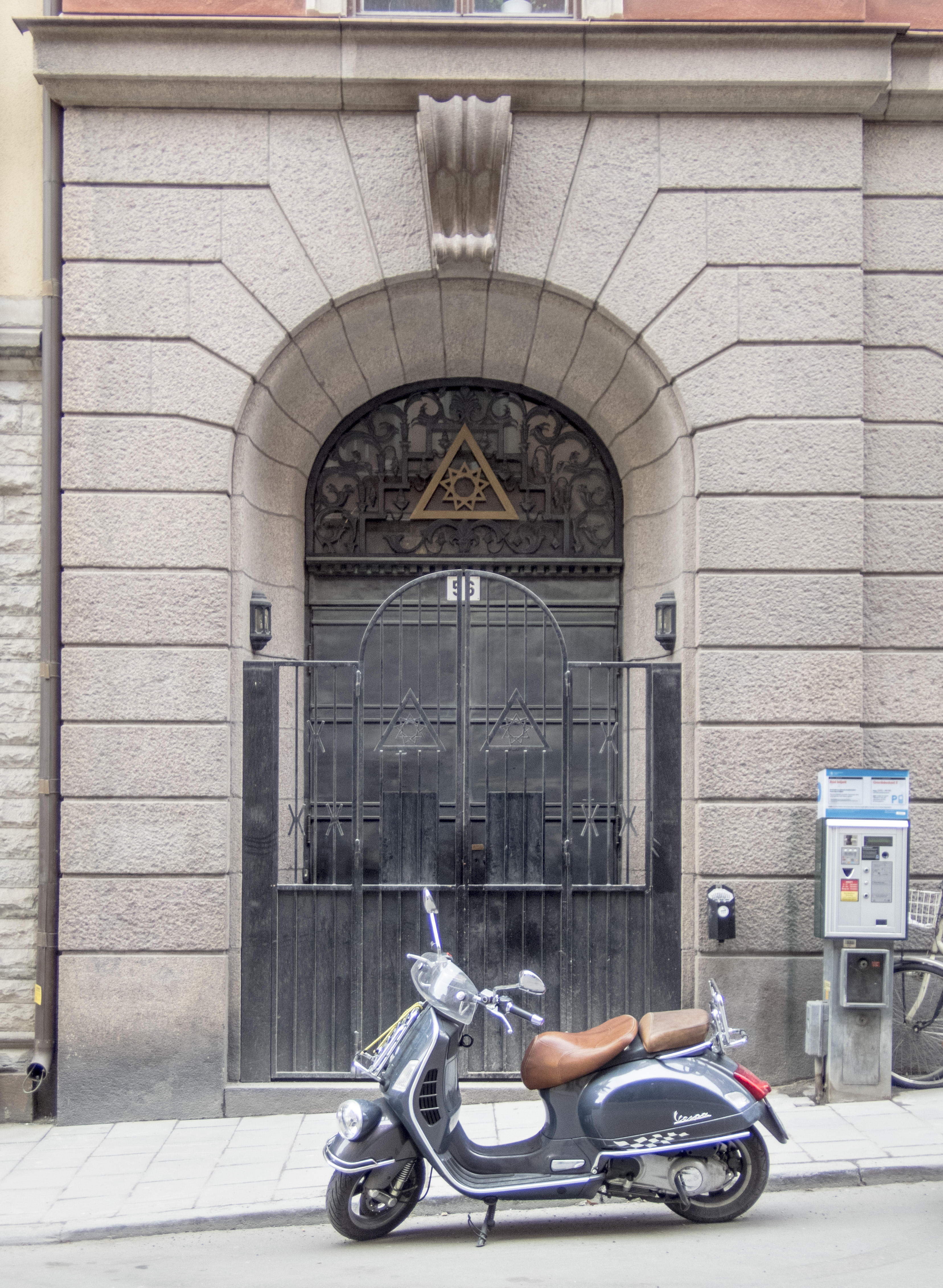 Tempel Riddare Orden, Kammakargatan 54-56 Stockholm